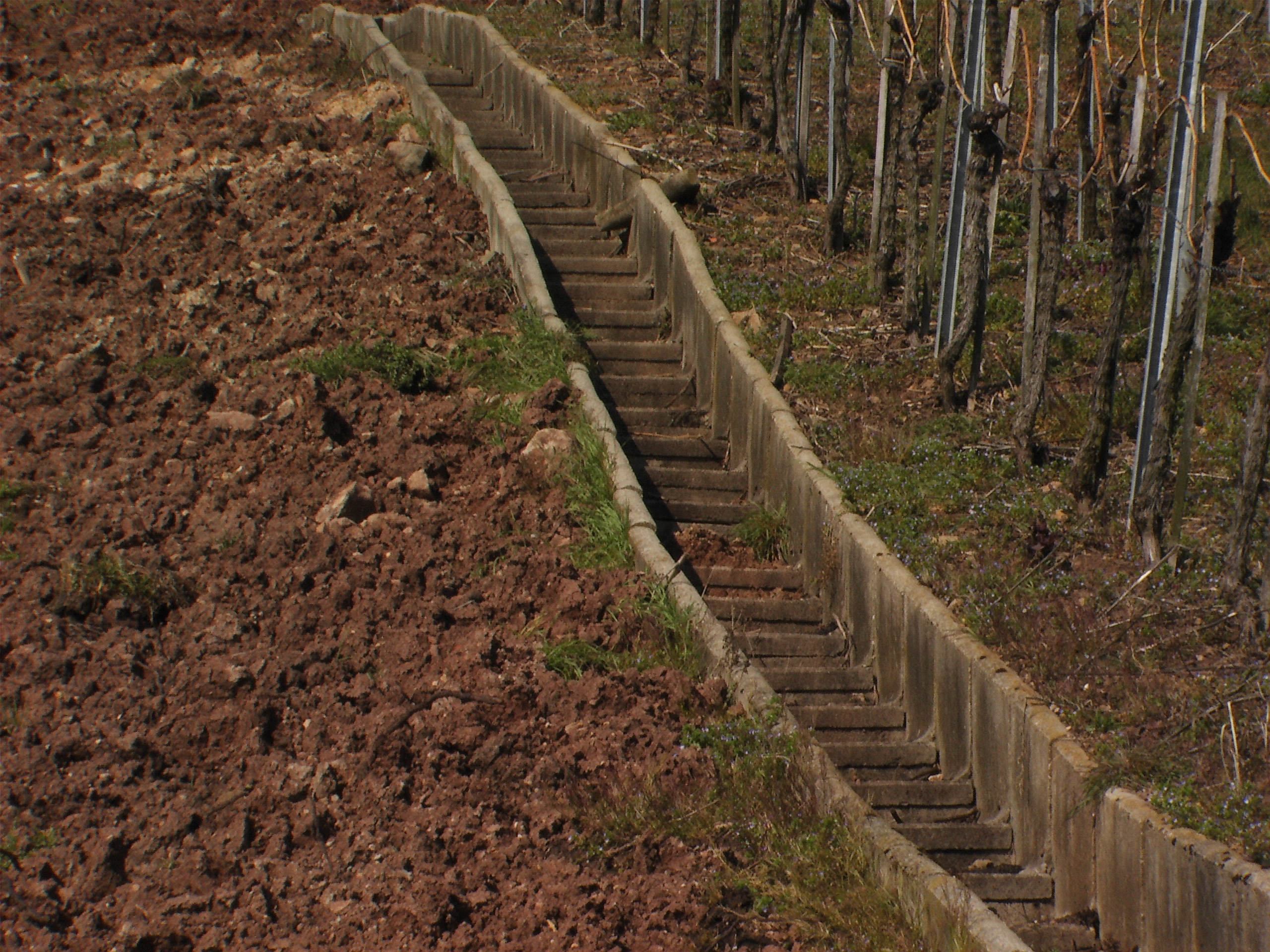 Wassertreppe im Weinbau nach Flurbereinigung